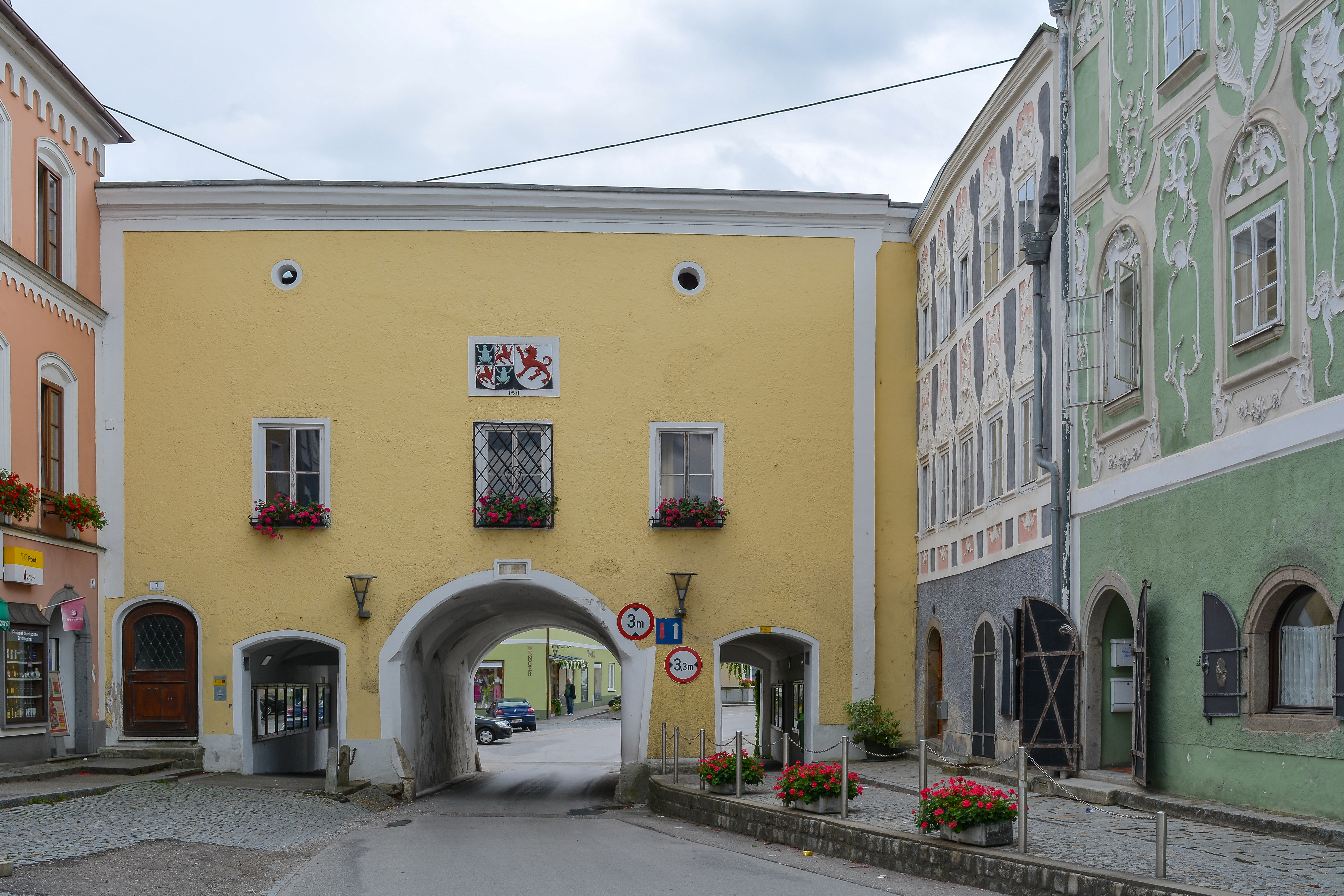 Stadttor, Rathaustor, vom Marktplatz aus gesehen